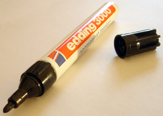 Ein Edding